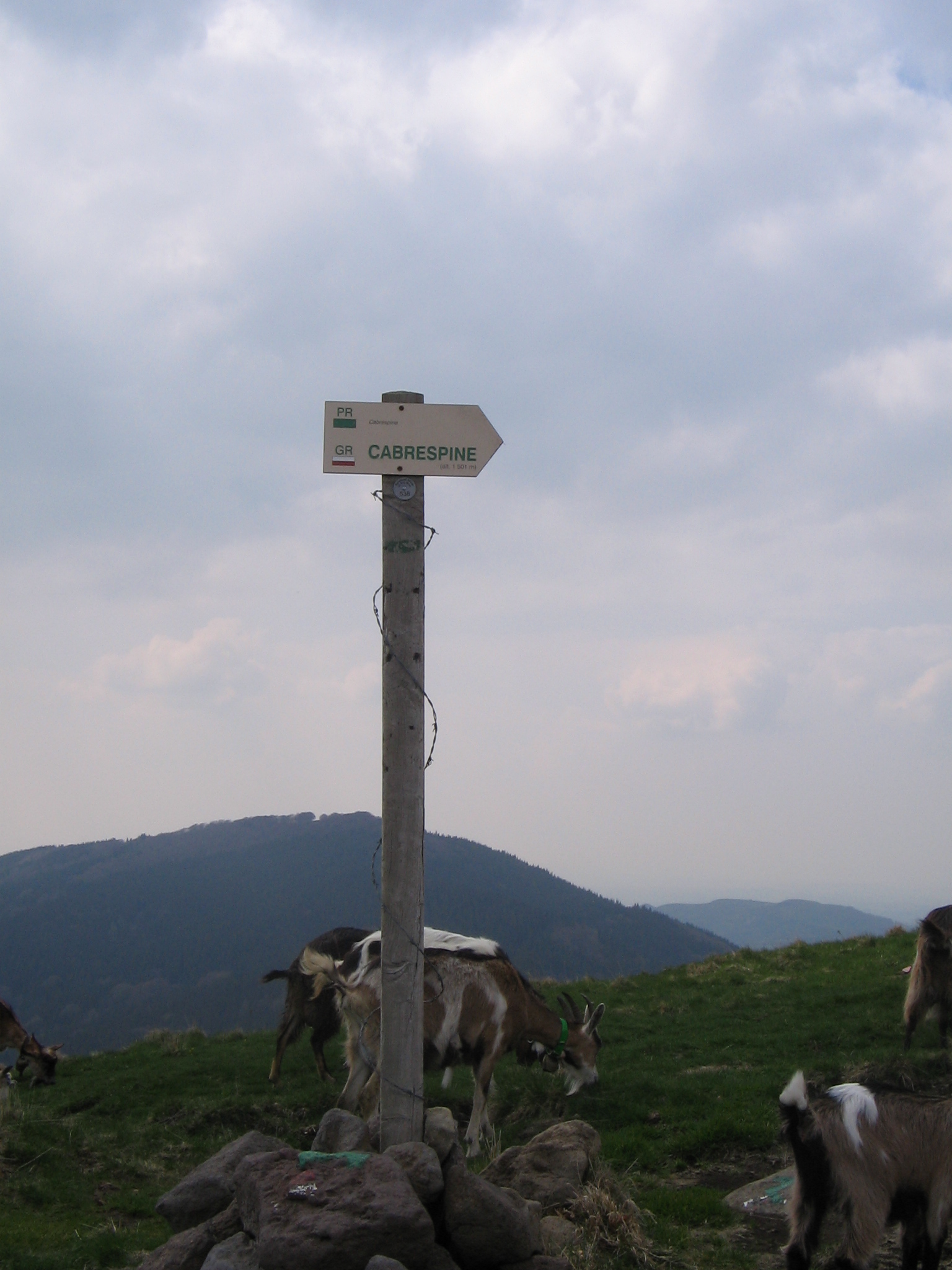 Panneau de randonné aux abord du GR400